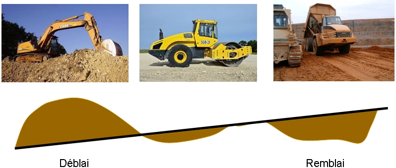 Cette image illustre ce qu'est un remblai et un déblai et montre les engins de chantier nécessaires pour réaliser les activités associées.